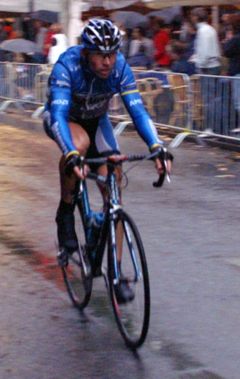 Dutch cyclist Max van Heeswijk during the Bavariaronde in Maastricht